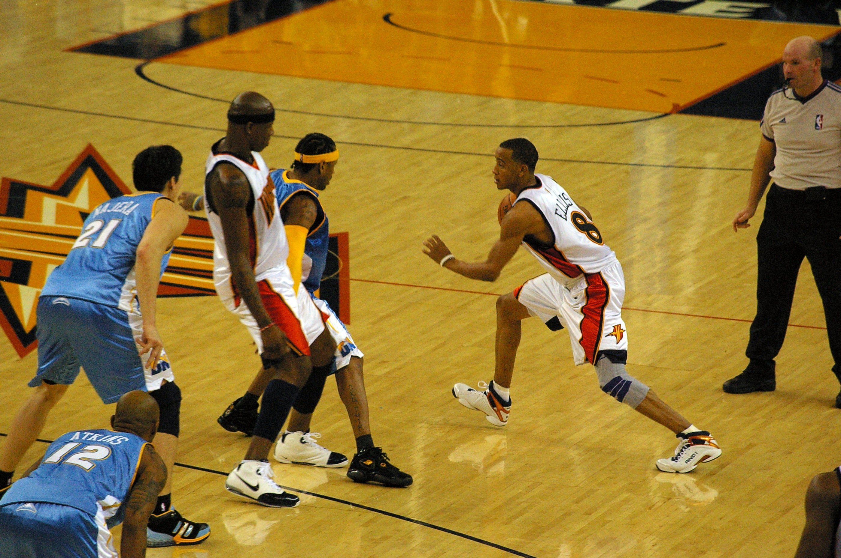 Ellis u prolazu tijekom utakmice s Denver Nuggetsima.